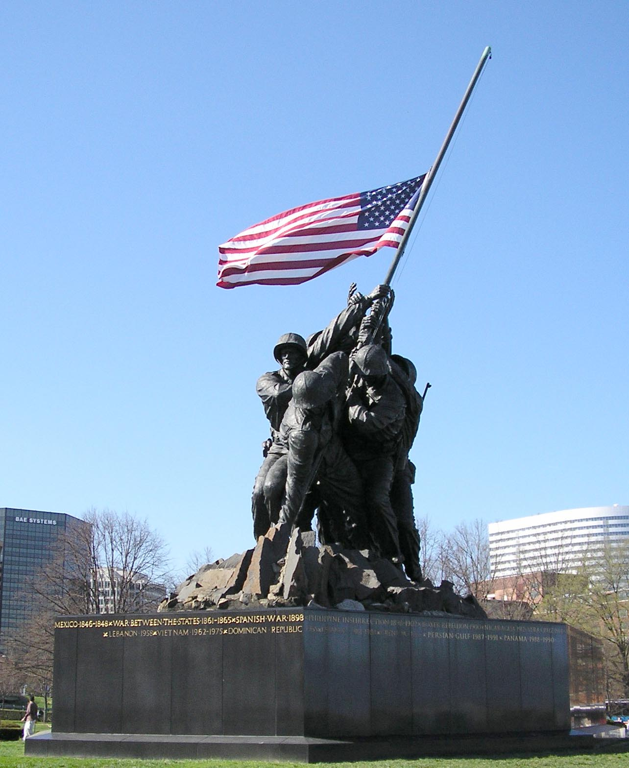 US Marine Corps Memorial med sockelinskription.Iwo Jima Monument